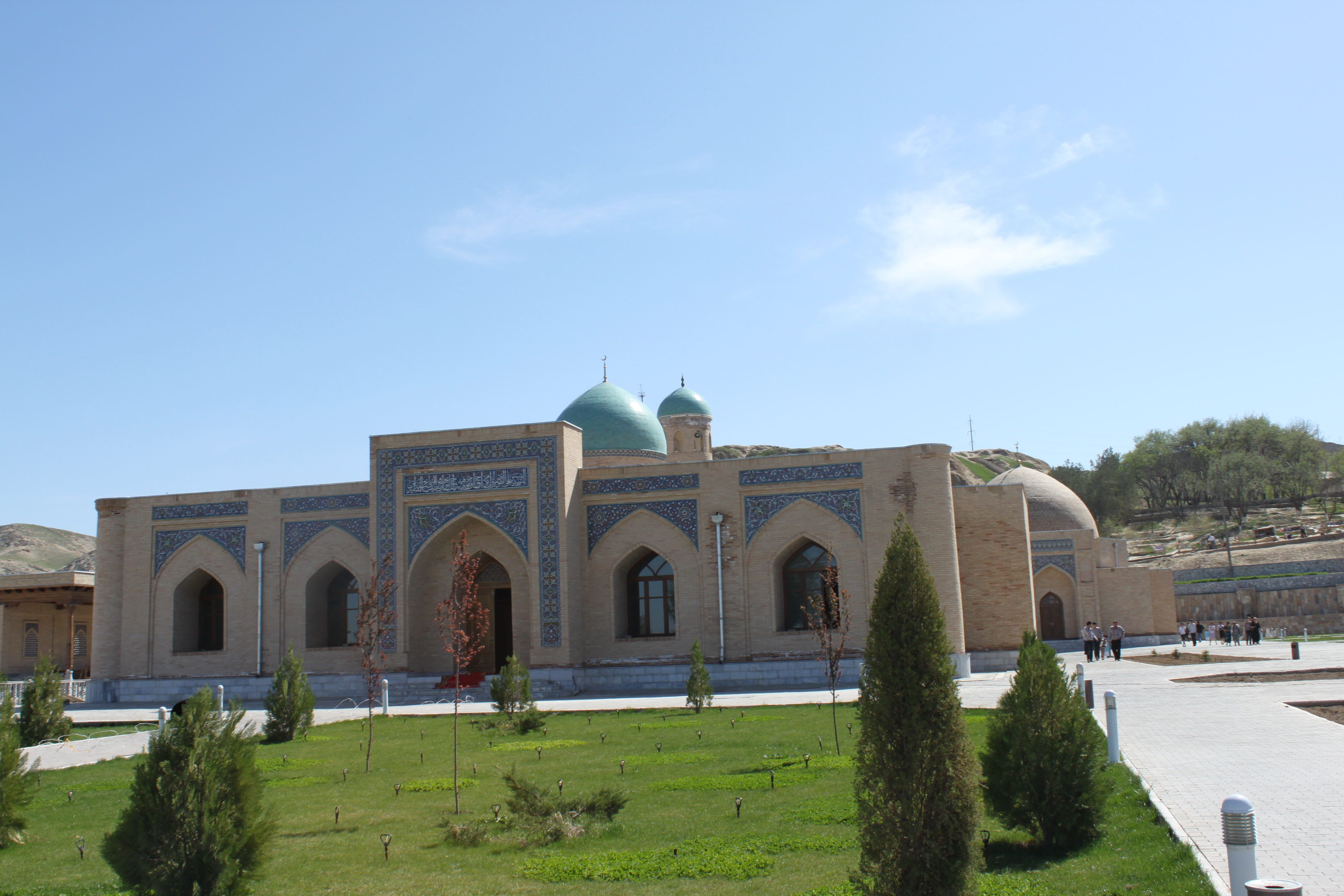 Mosquée Panjvakhta site de la source Tchachma à Nourata